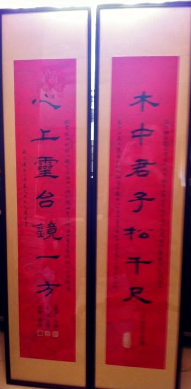 中文（香港）: 李怡嵌名聯